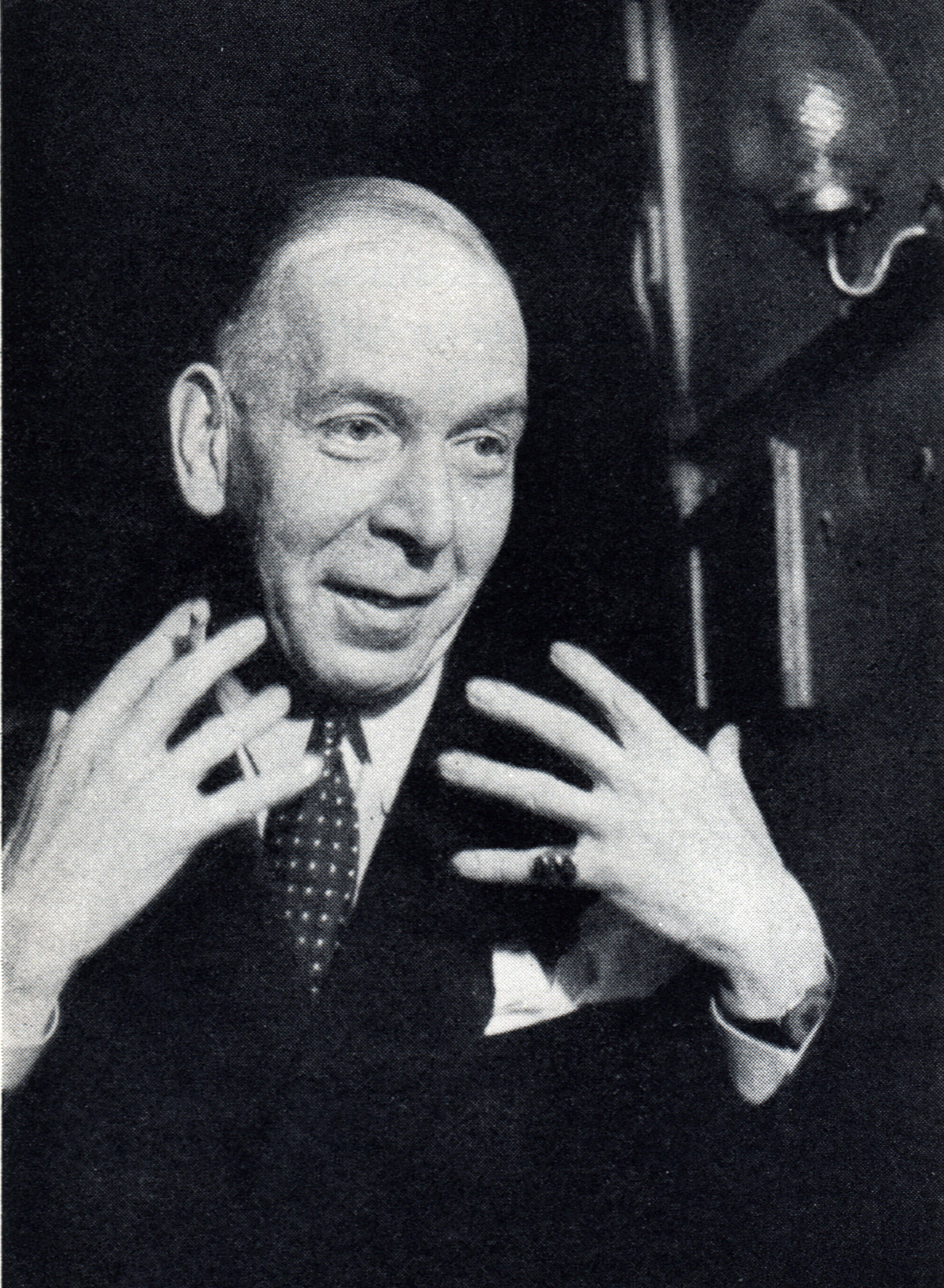 Balletdansören och koreografen George Gé